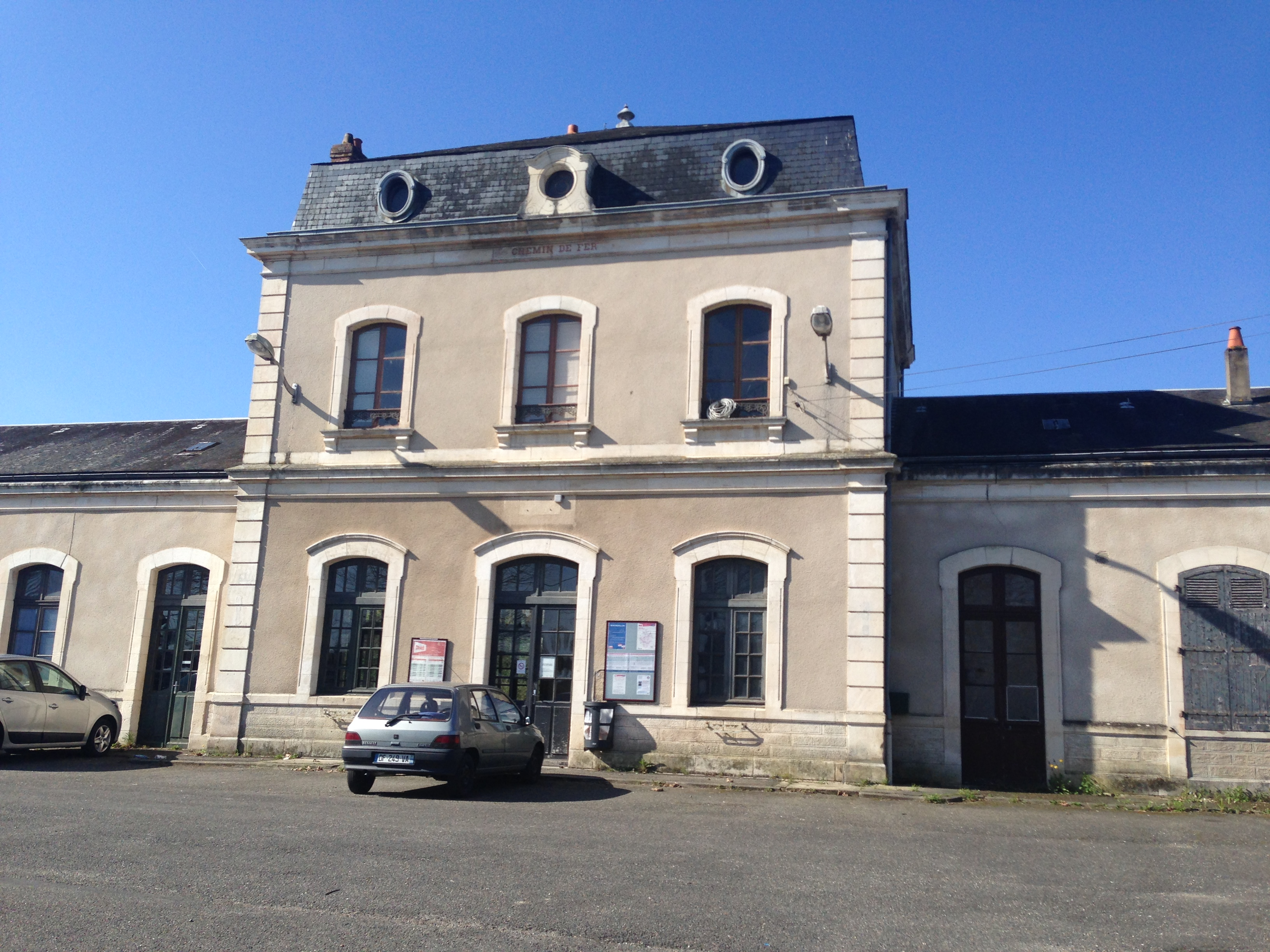 Gare de Montmorillon en Avril 2015